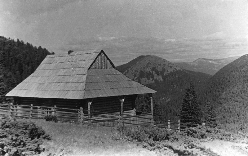 Притулок товариства «Плай»